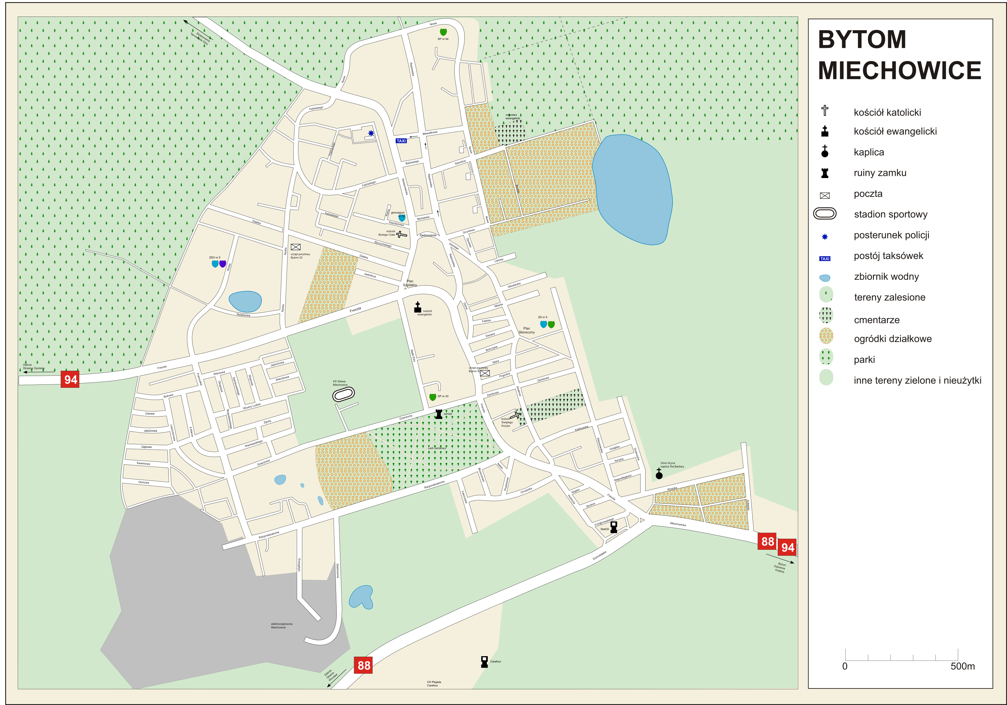 Bytom Miechowice - plan dzielnicy. Zastrzeżenie: Niniejszy plan ma charakter orientacyjny. Autor dołożył wszelkich starań aby prezentowane informacje były rzetelne, jednak wykorzystując je, robisz to na własną odpowiedzialność. Plan jest wciąż uzupełniany, prezentowane informacje mogą ulegać zmianom.